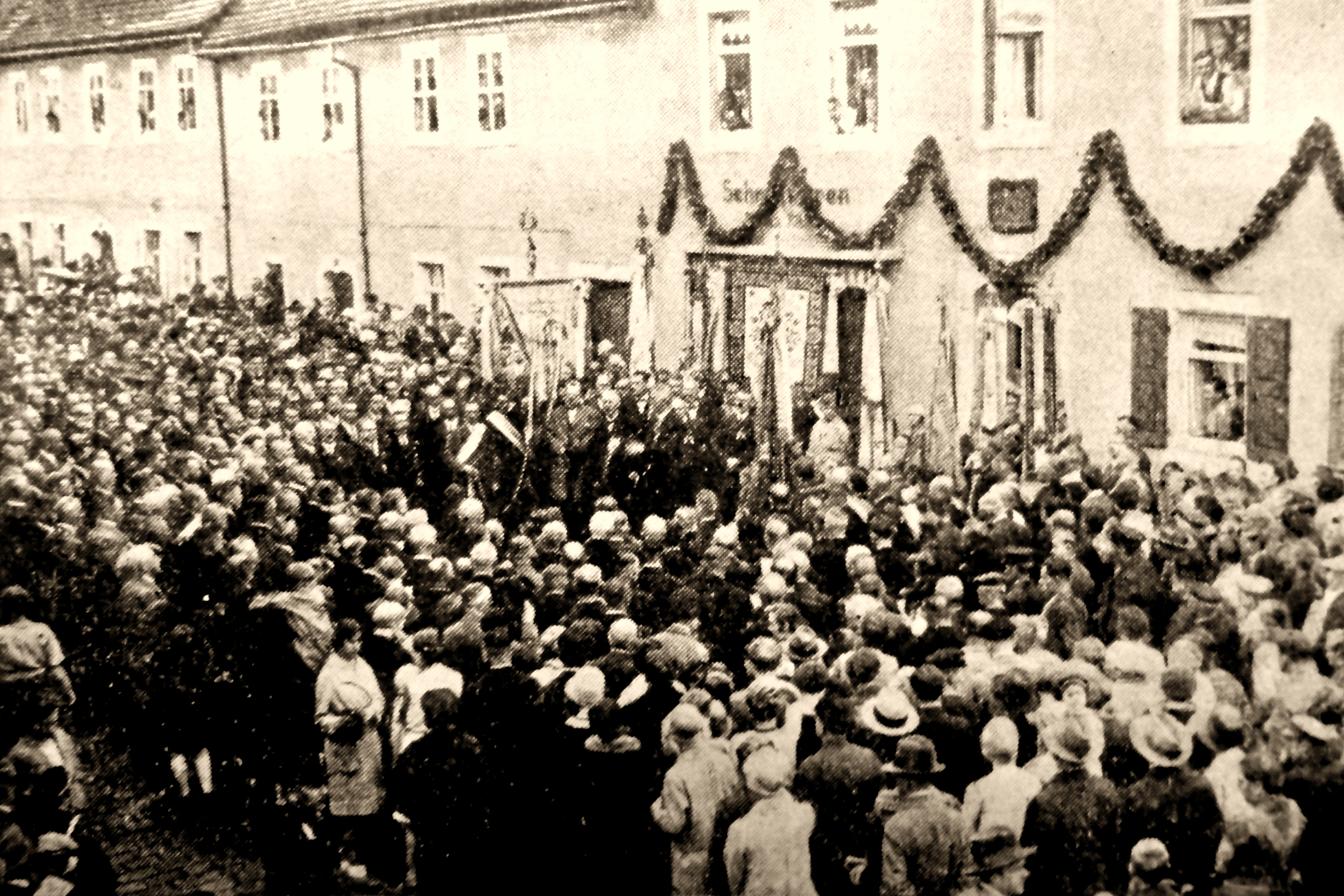 Einweihung der Gedenktafel für Gelbke 1930